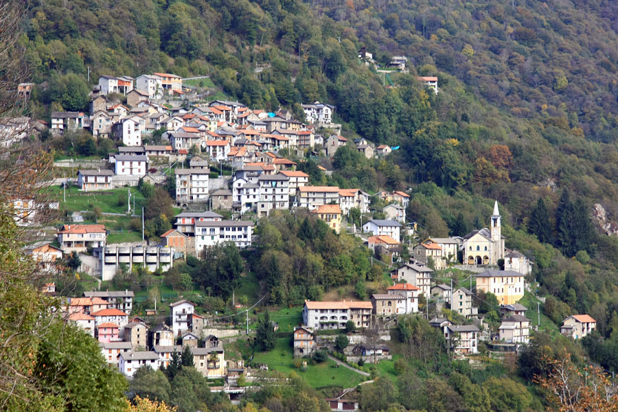 Panorama di Aurano (VB)